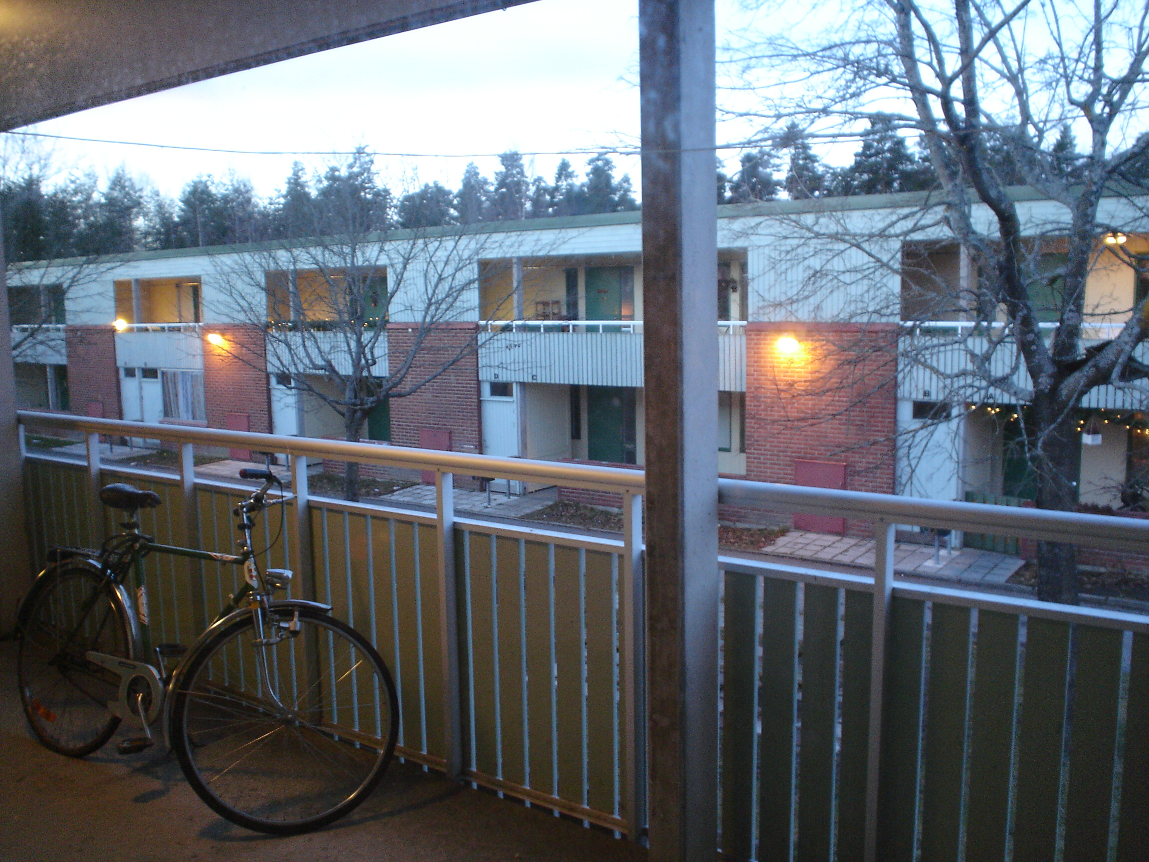 Bostadslänga i Brickebacken